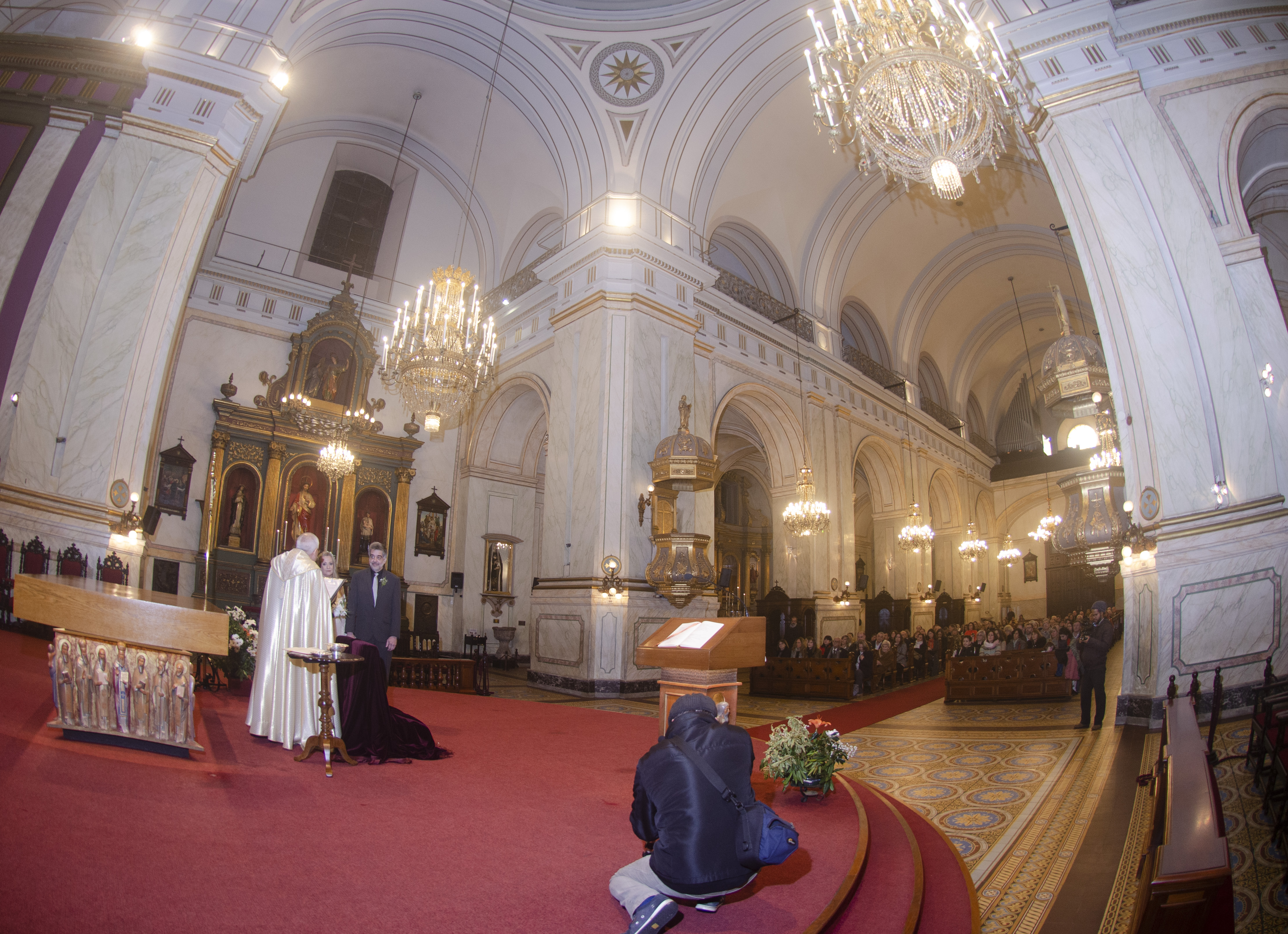 Iglesia Matriz por dentro, Montevideo, Uruguay. Se ve el altar y la nave principal. Catedral metropolitana de Montevideo.